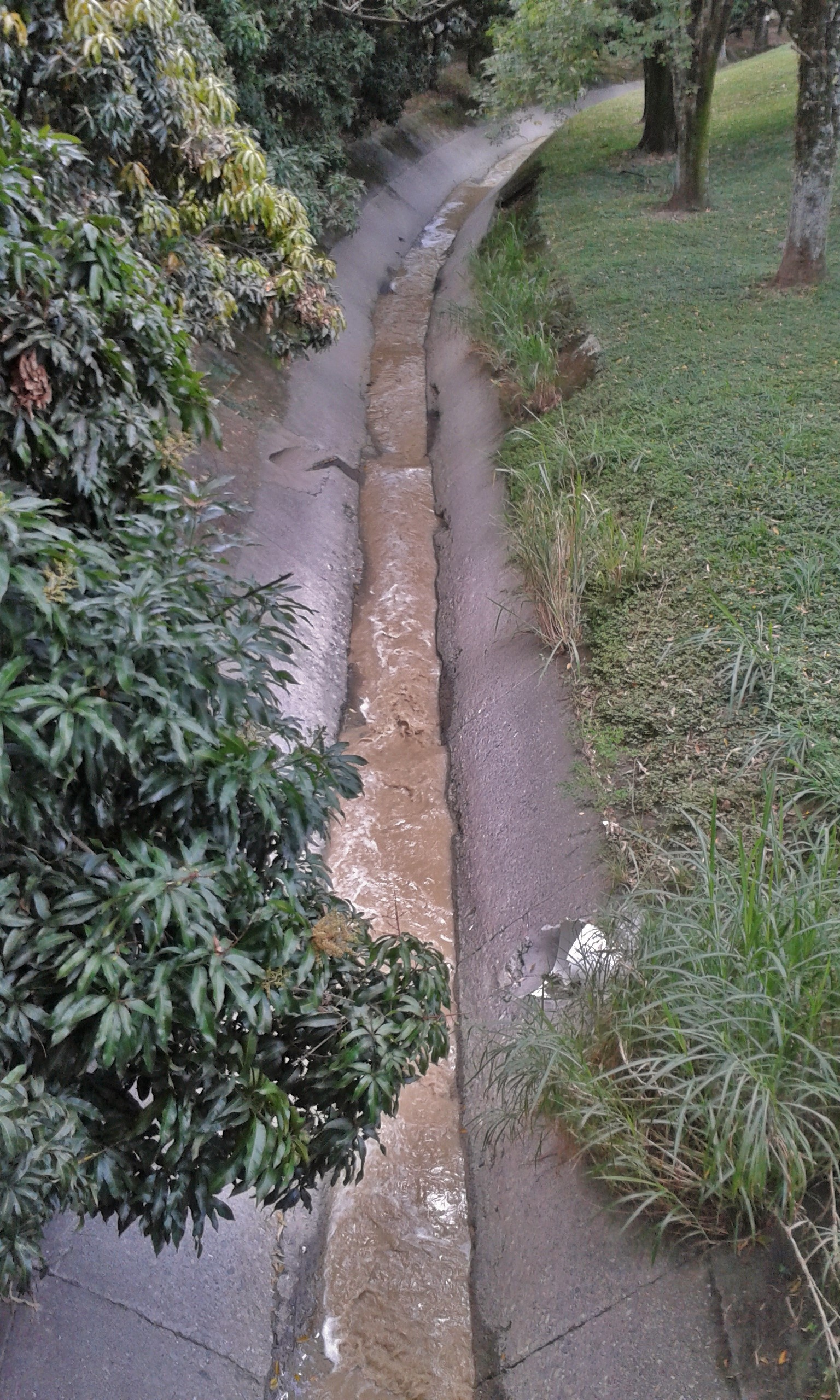 Quebrada Ana Díaz, Medellín